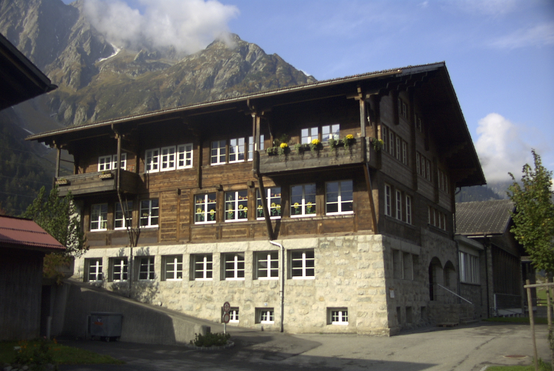 Schulhaus Guttannen, CH-3864 Guttannen